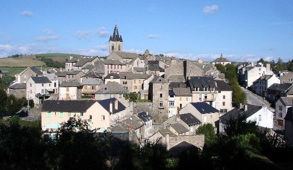 Le bourg de Salles-Curan (Aveyron)